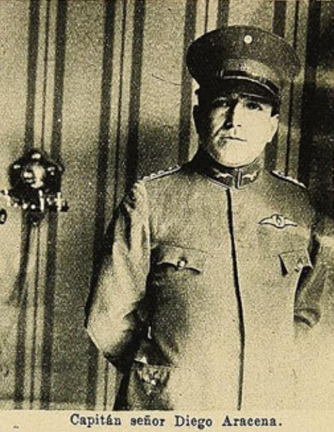 Diego Aracena Aguilar1 (12 de noviembre de 1891 - Santiago el 02 de mayo de 1972) Militar chileno, Comandante en Jefe de la Fuerza Aérea de Chile